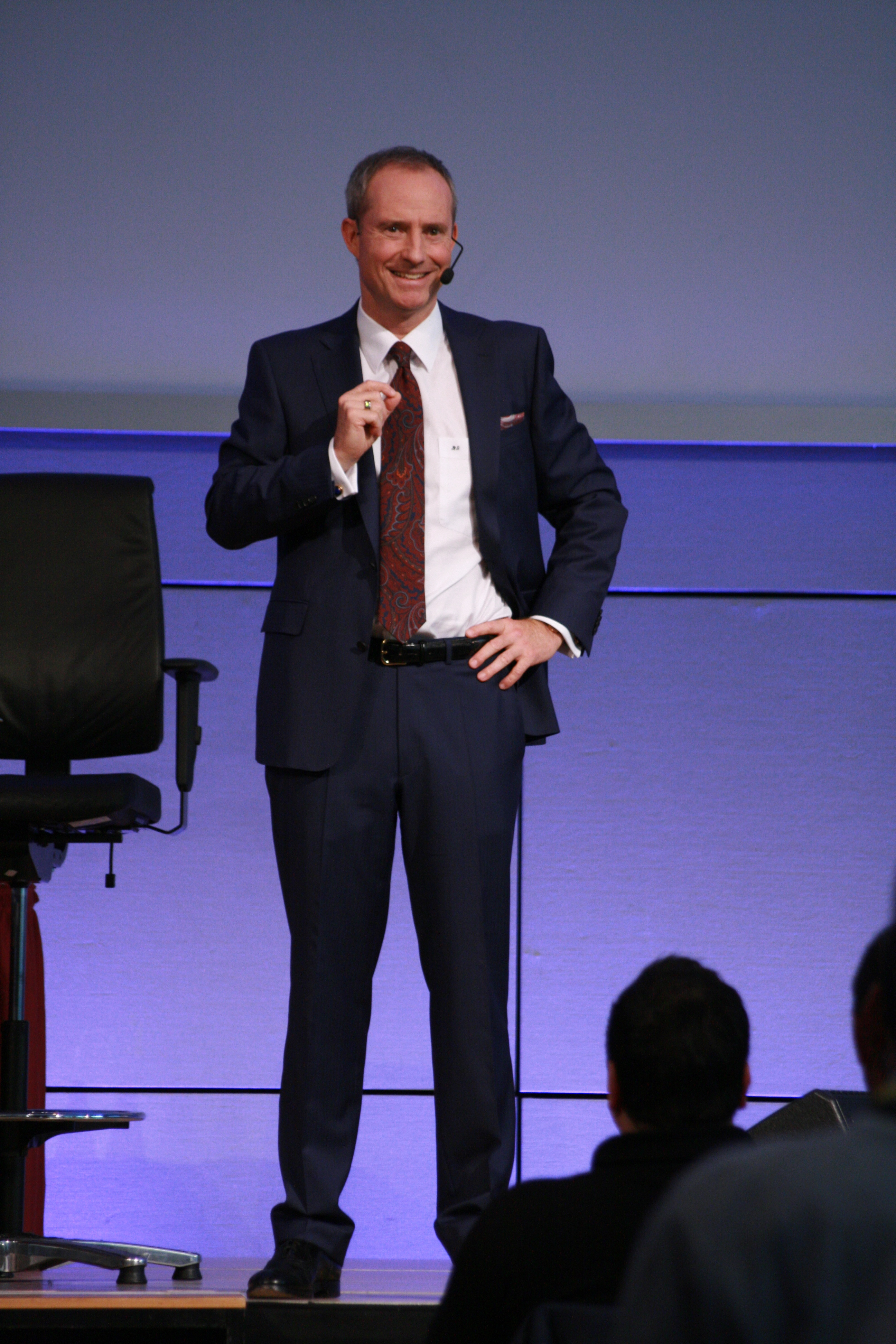 Bodo Schäfer deutscher Bestsellerautor, Motivationstrainer und erfolgreicher Unternehmer.